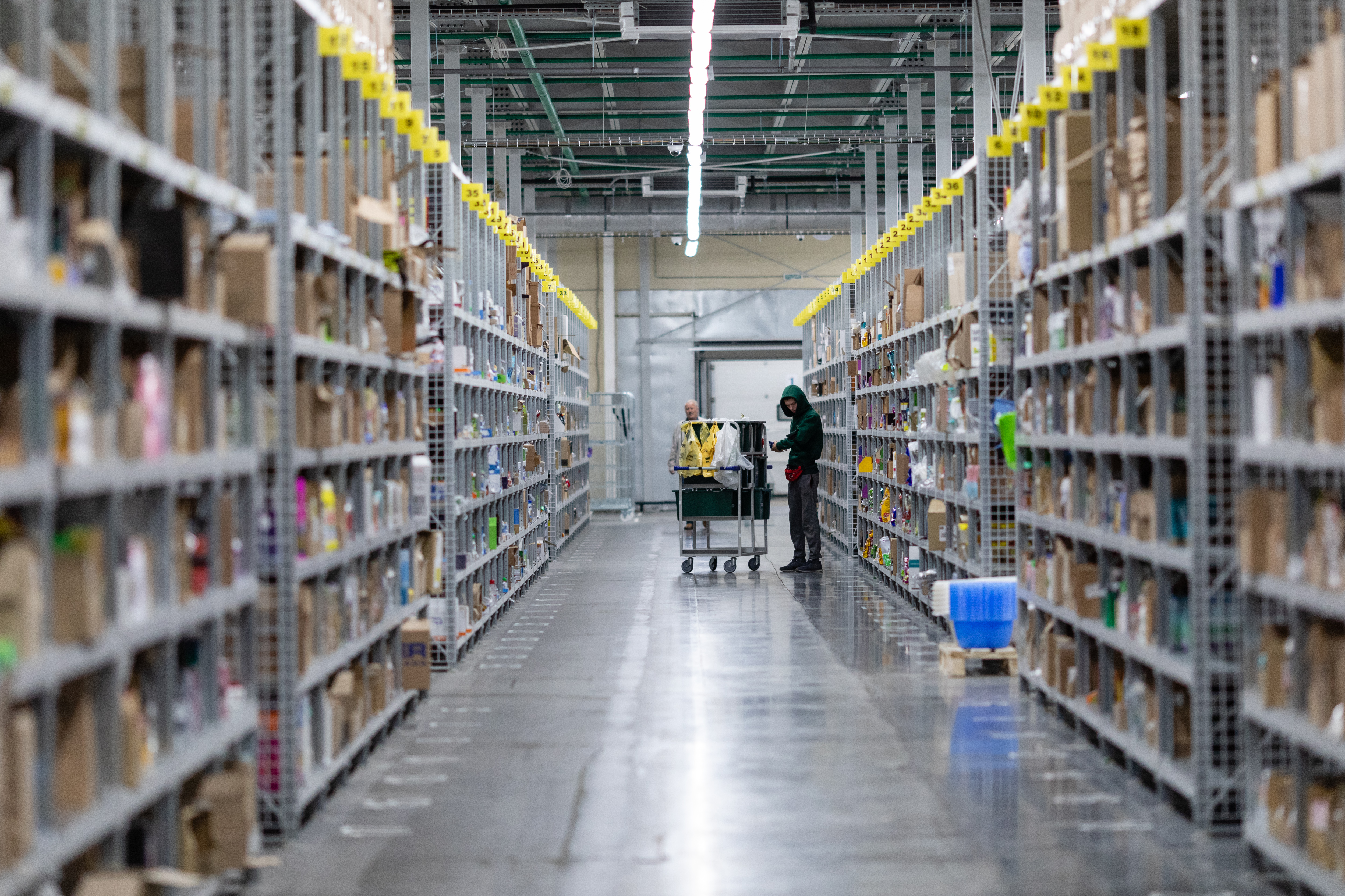 В 2017 году был запущен онлайн-магазин Perekrestok.ru. Доставка заказов осуществляется с dark store - магазин без покупателей, который совмещает черты традиционного магазина и склада. Dark-store не предназначен для совершения покупок клиентами, но выкладка товаров похожа на магазинную. В отличие от традиционного склада, dark store предназначен для обслуживания интернет-заказов — выкладка товара штучная.